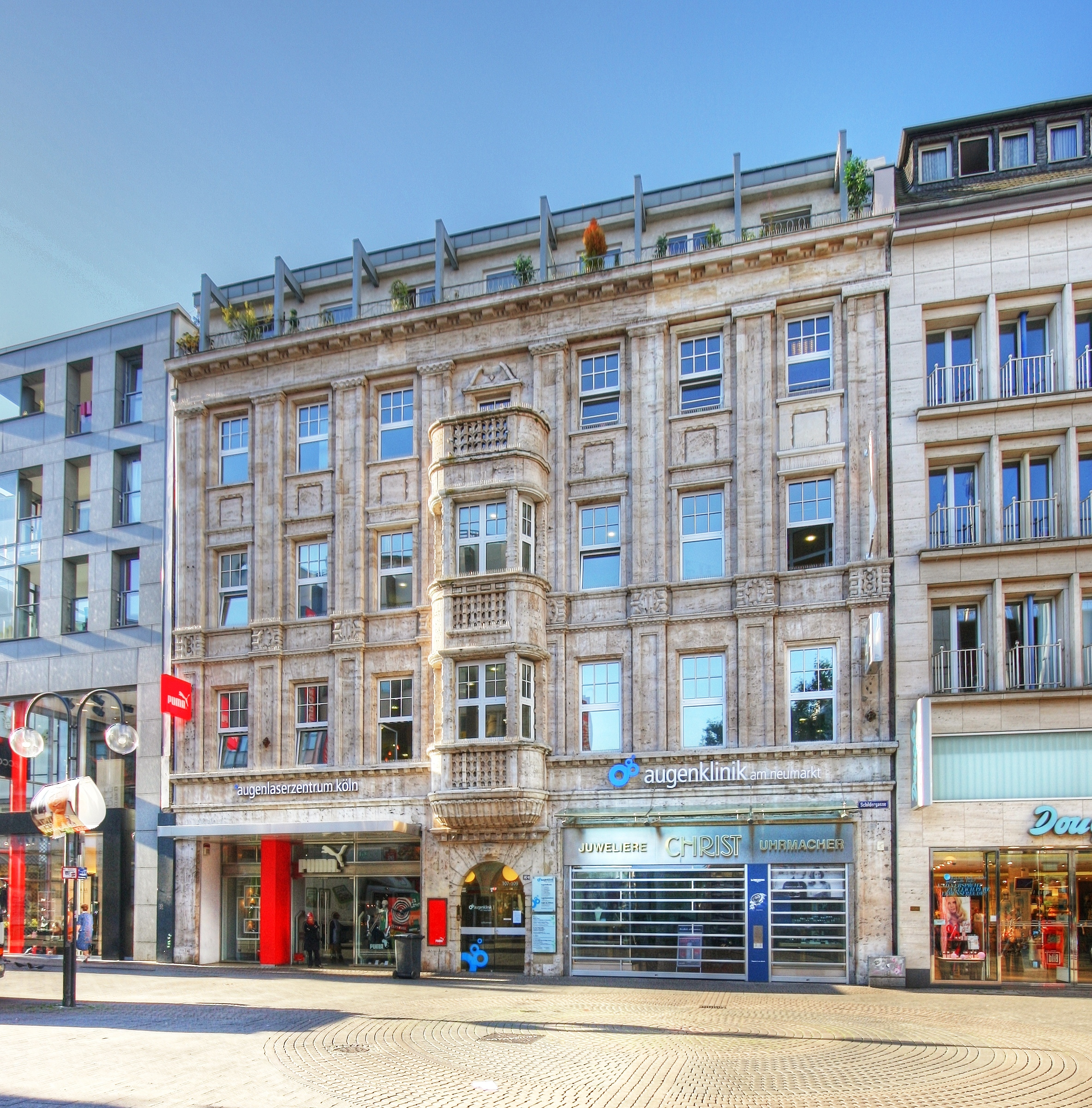 Denkmalgeschütztes Geschäftshaus Schildergasse, Köln. Architekt: Heinrich Müller-Erkelenz, Baujahr: um 1910